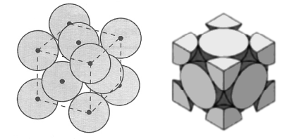 Visualizzazione della cella cubica a facce centrate (face centred cubic)